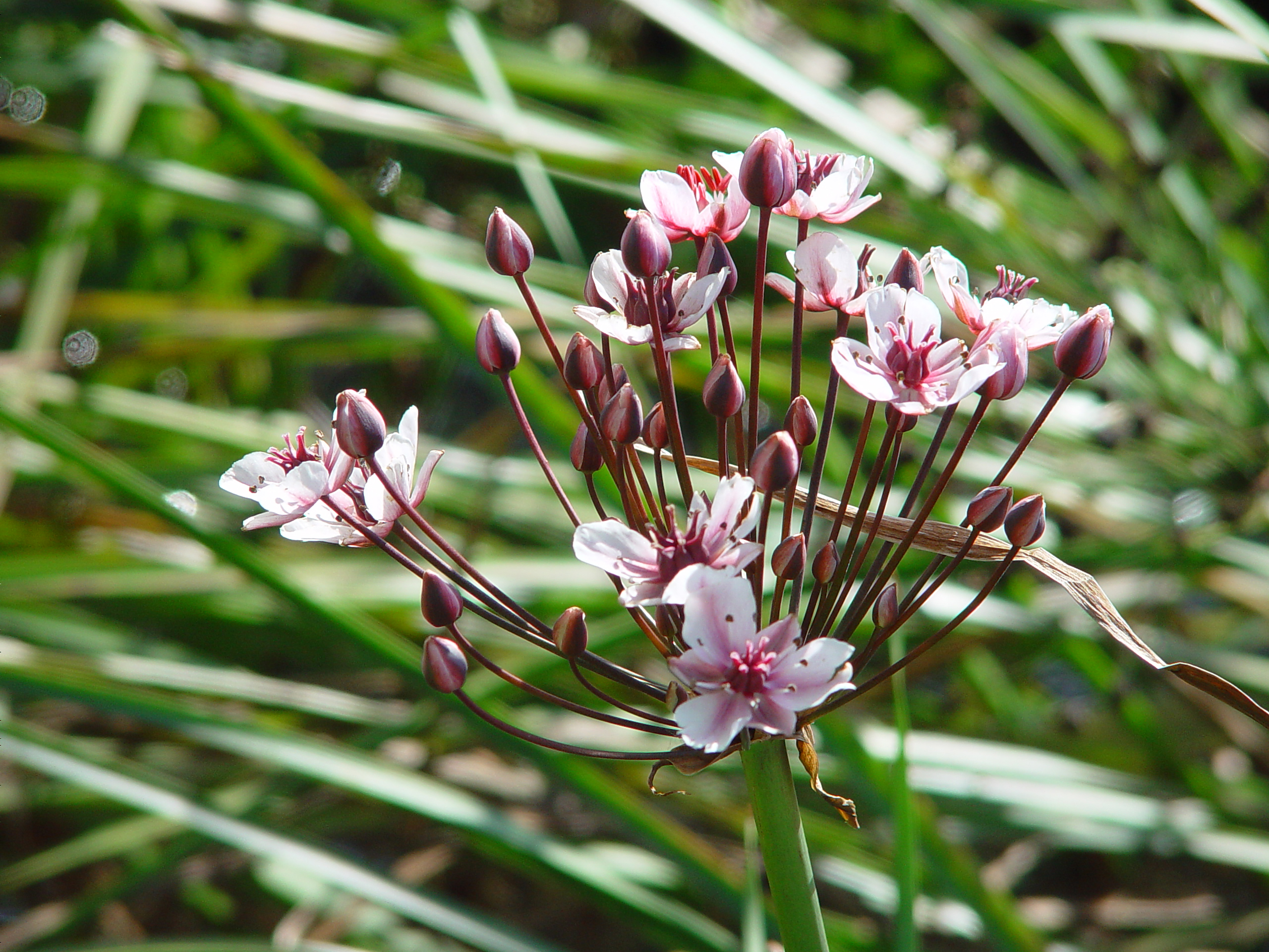 Die Schwanenblume (Butomus umbellatus), auch Wasserliesch, Blumenbinse, Doldige Schwanenblume oder Wasserviole genannt, ist eine Pflanzenart, die an Gewässerufern und in Feuchtgebieten vorkommt. Sie ist die einzige Art der Familie Schwanenblumengewächse (Butomaceae) und gilt als eine der schönsten in Mitteleuropa heimischen Sumpfpflanzen. Aufnahmedatum: Fotografiert am 31. August 2003 Fotograf: ArtMechanic